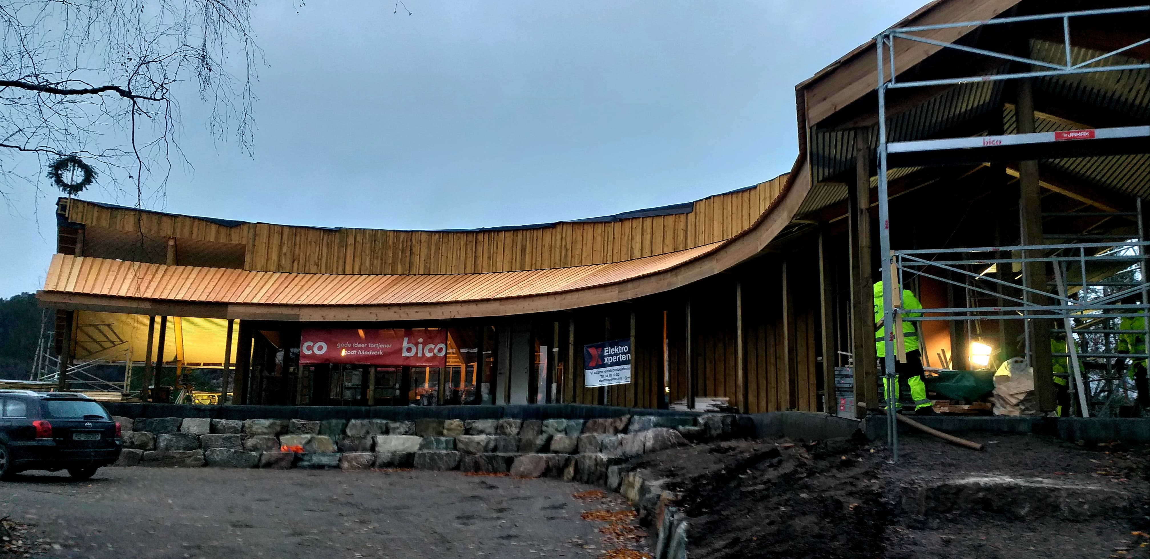 Vaffelbua, dagsturhytta ved Kyrtjønn i Kristiansand, kranselag i november 2018.